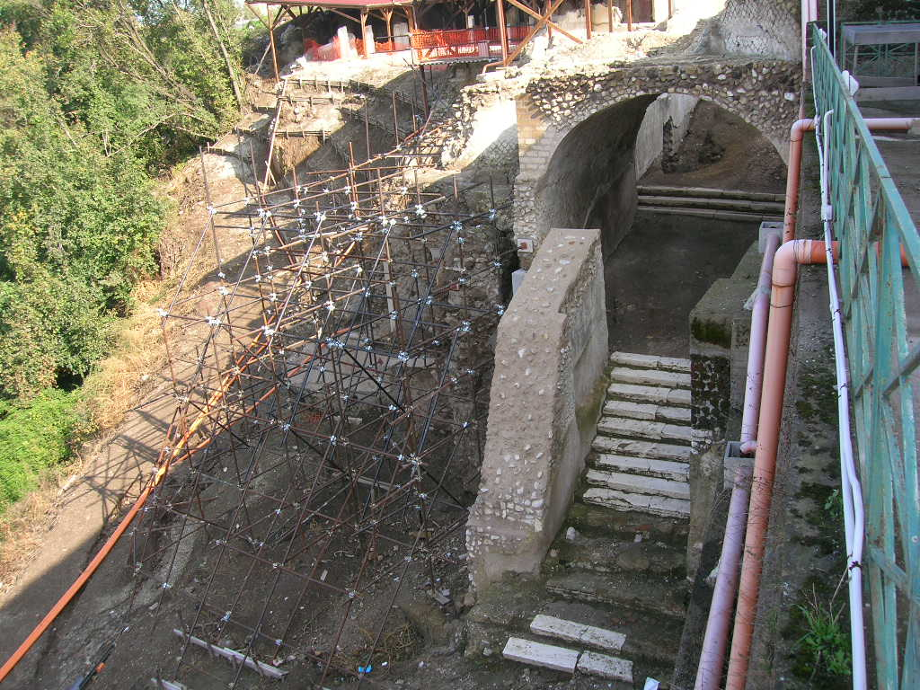 Antica porta di Stabiae, risalente al periodo prima della distruzione di Silla.